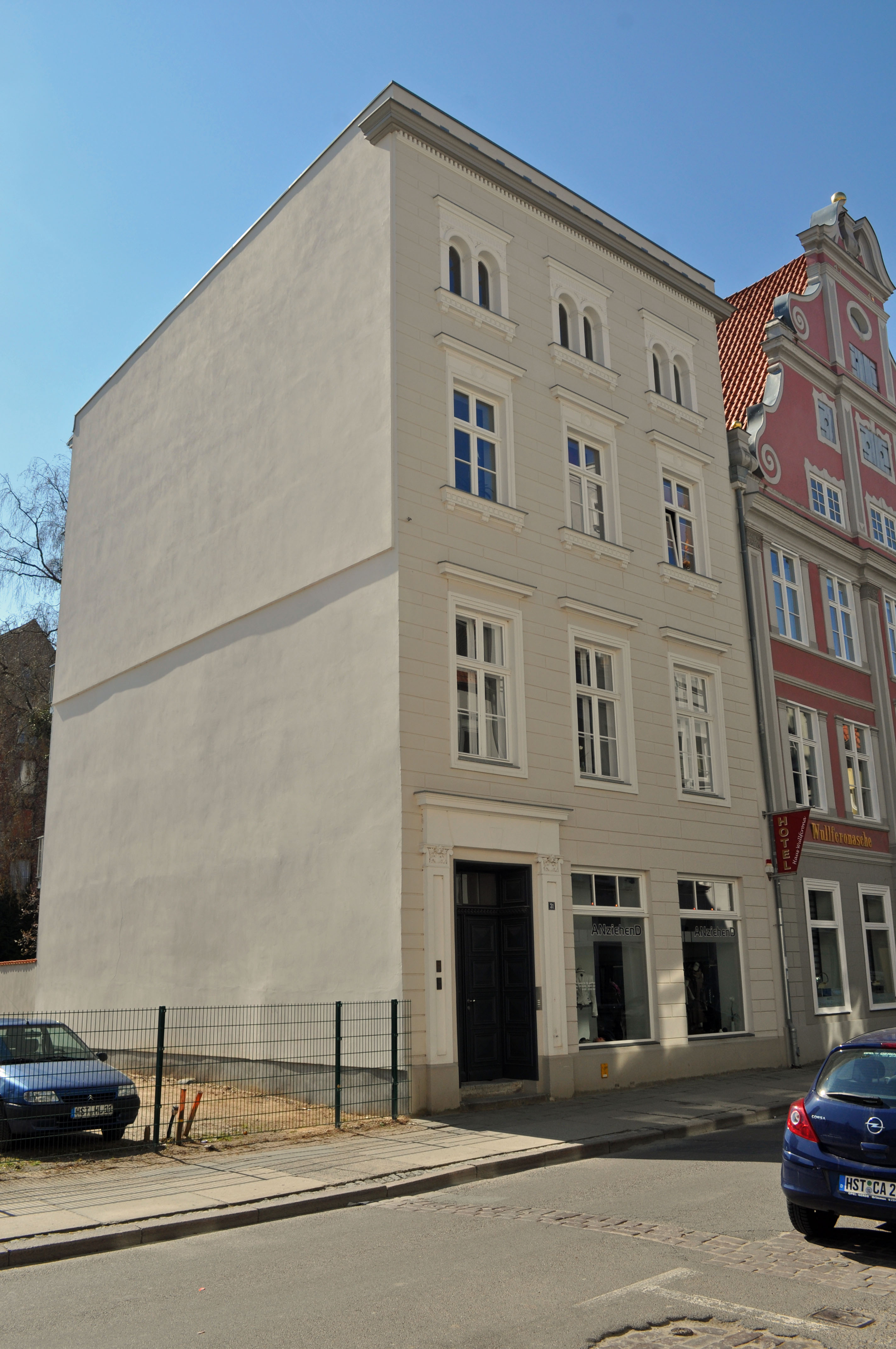 Gebäude bzw. Gebäudedetail in Stralsund. Straße und Hausnummer siehe Dateiname.